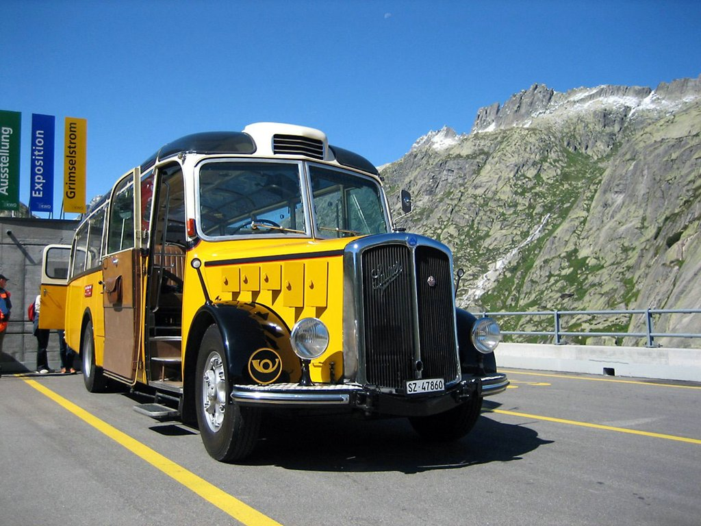 Postauto oldtimer (old Saurer bus) on Grimselpass, Switzerland (3-Pass-roundtrip, germ. Drei-Pässe-Fahrt)